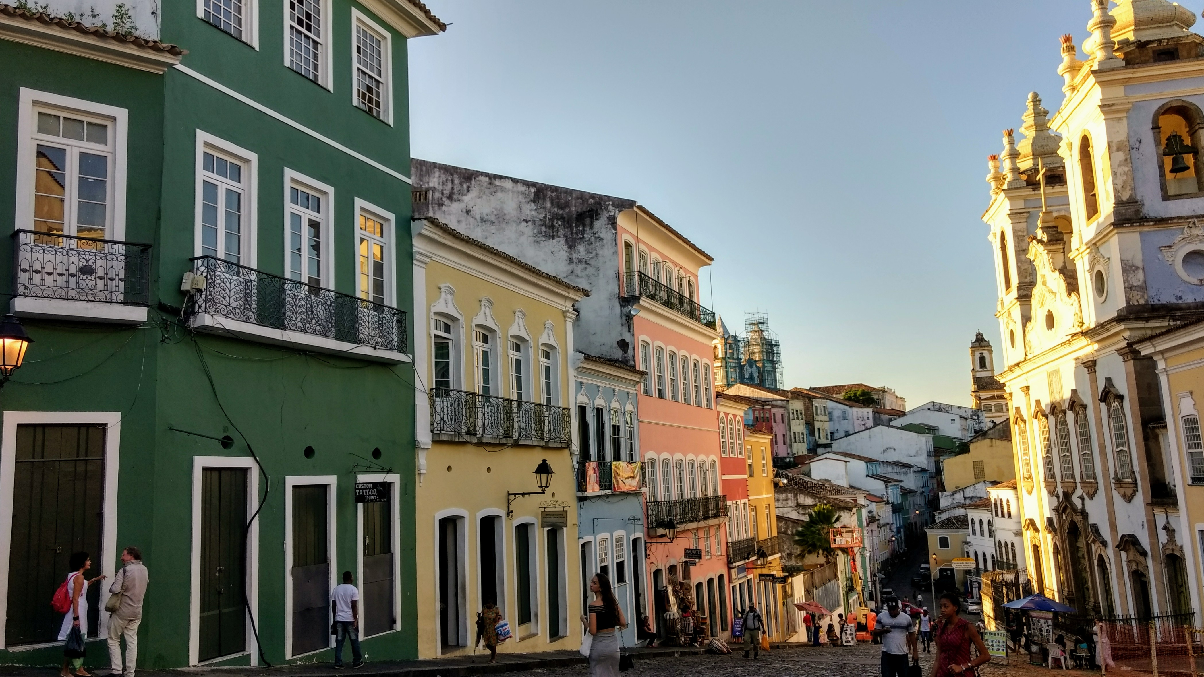 Salvador, BA: conjunto arquitetônico, paisagístico e urbanístico do centro histórico. Pelourinho.